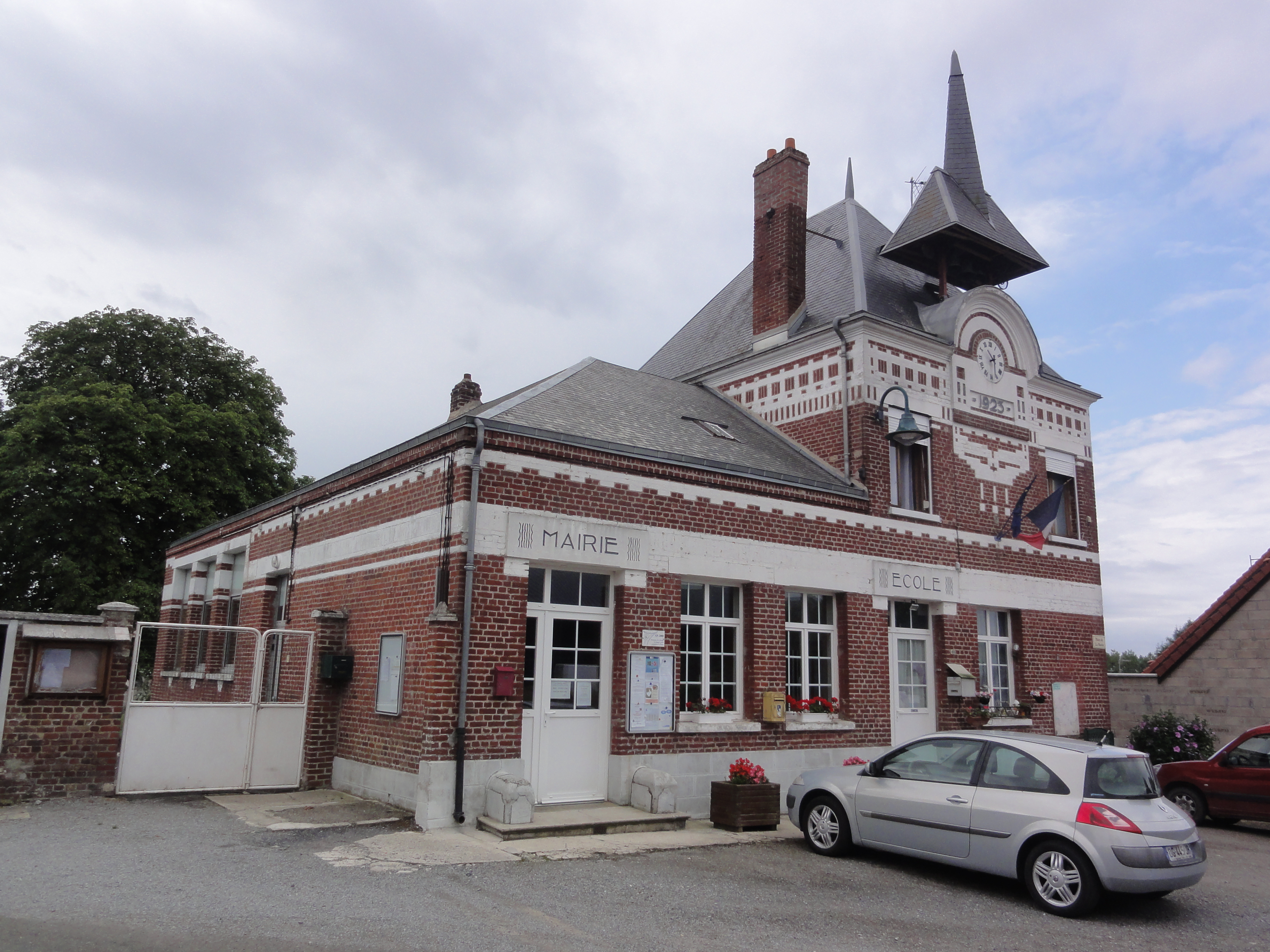 Happencourt (Aisne) mairie